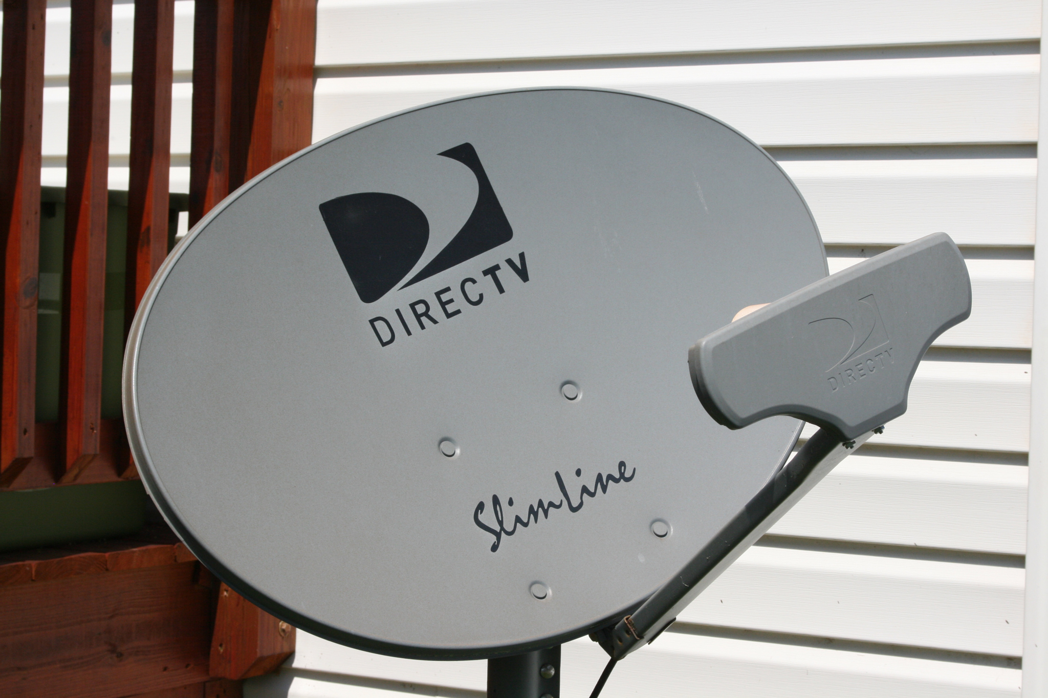 DirecTV 5 LNB Slimline